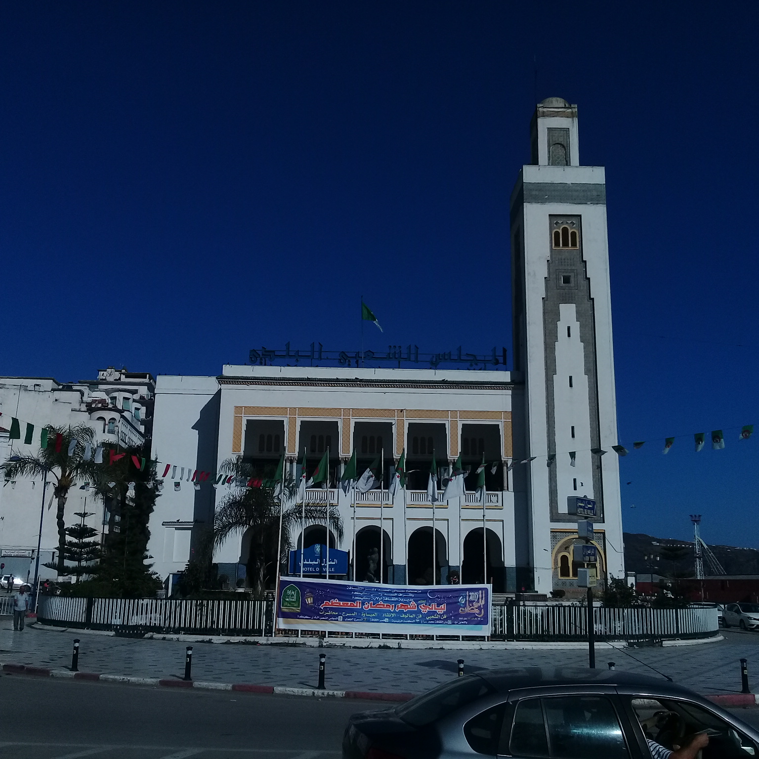 المجلس الشعبي البلدي لمدينة سكيكدة